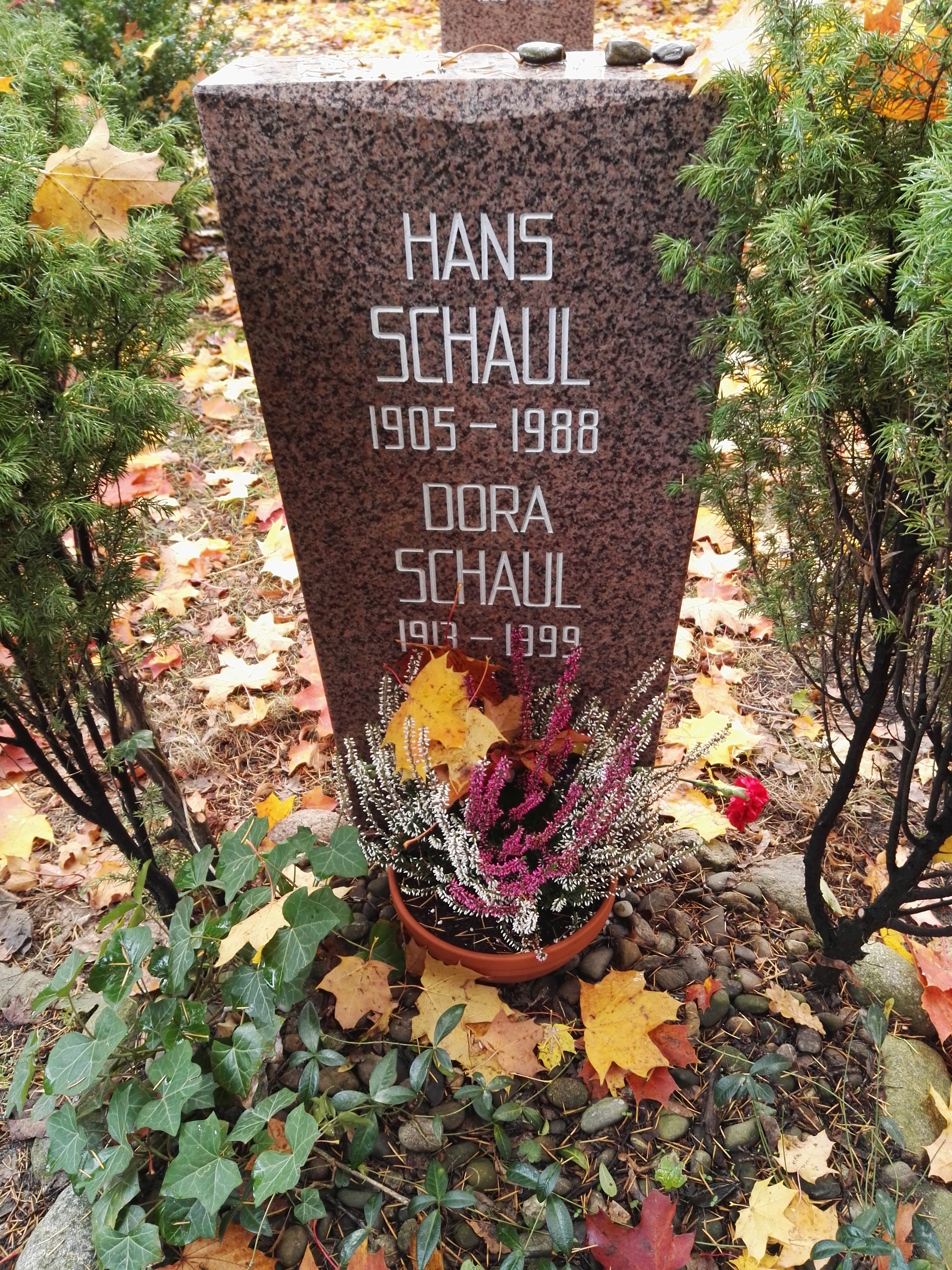 Grab von Hans Schaul und Dora Schaul auf dem Sozialistenfriedhof des Zentralfriedhofs Friedrichsfelde